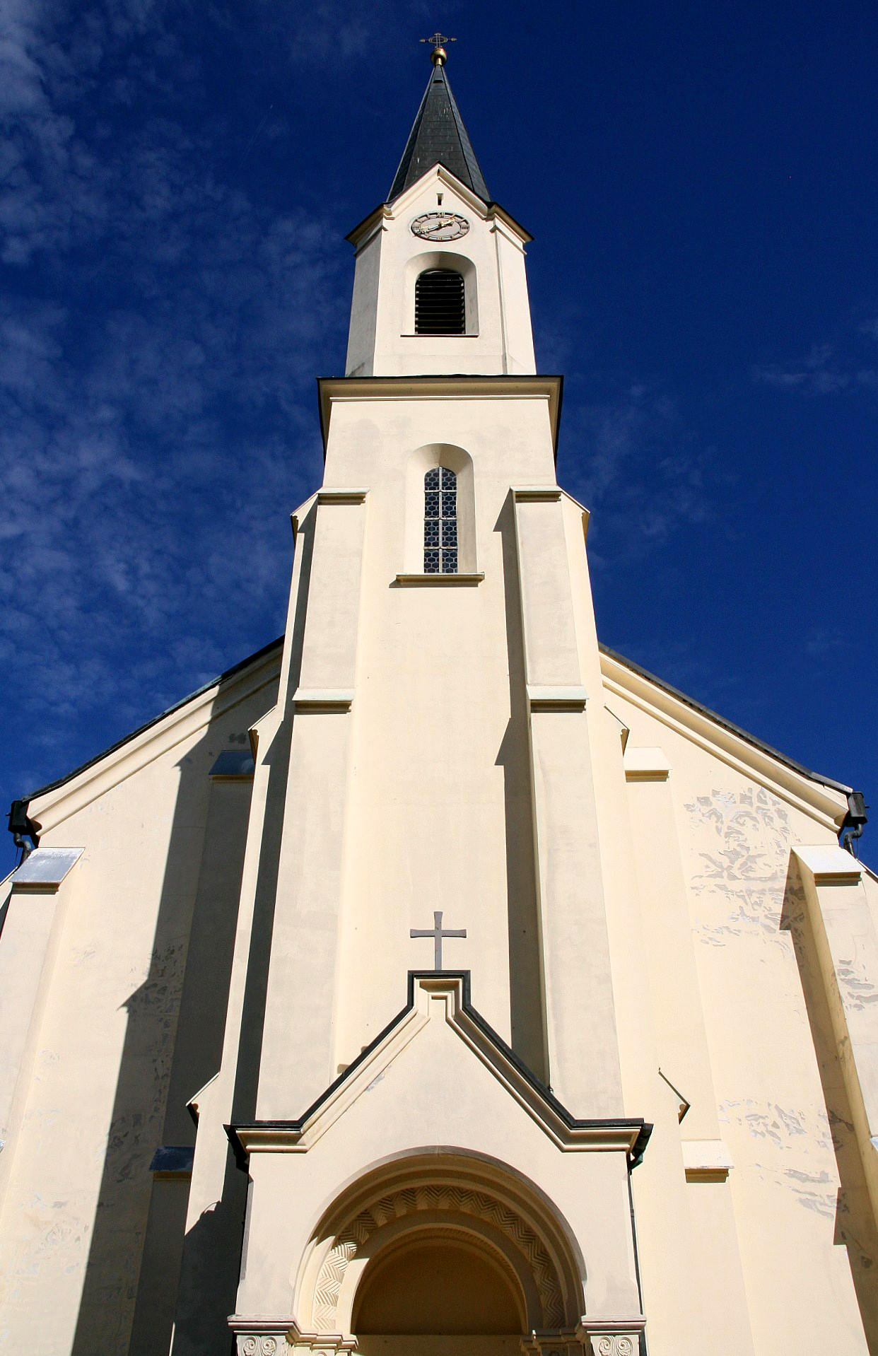 Pfarr- und Klosterkirche Herz Jesu in Zangberg (Landkreis Mühldorf am Inn, Oberbayern). Die stark vertikal wirkende Vorderseite des historistisch-neoromanischen Bauwerks (errichtet in der zweiten Hälfte des 19. Jahrhunderts).